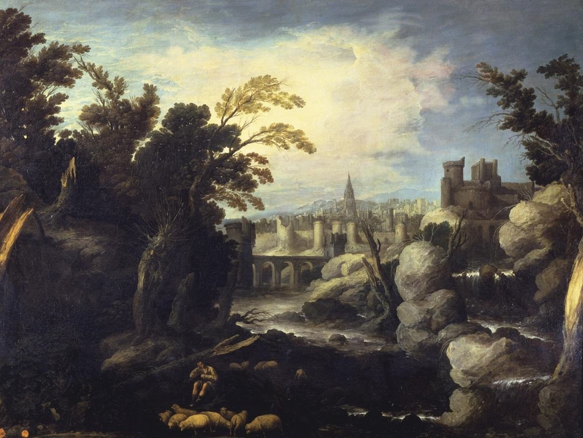 La obra representa una ciudad amurallada, a la derecha aparece un castillo, y en primer plano puede observarse a un pastor junto a un rebaño de ovejas.